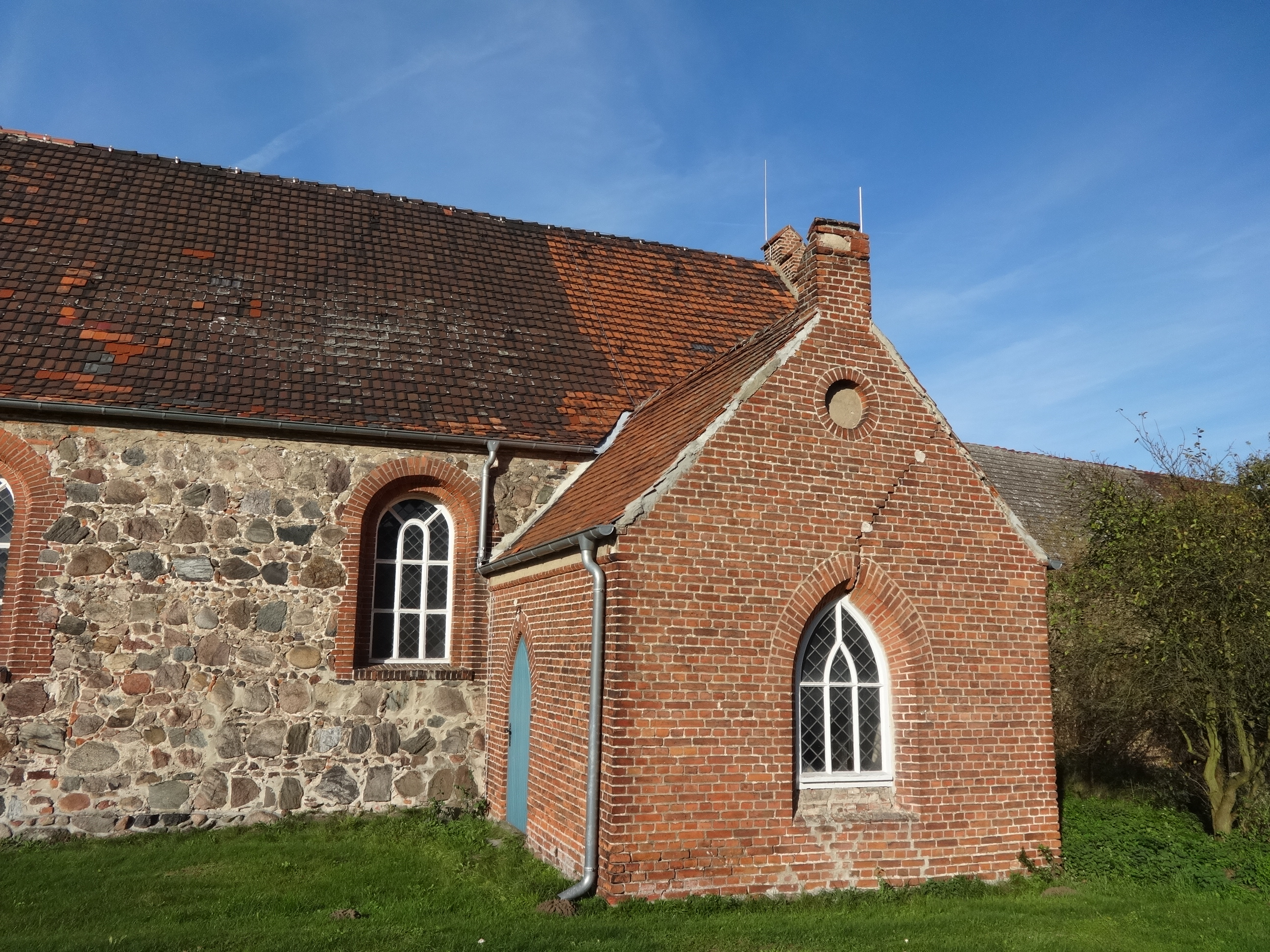 Das Bauwerk entstand in den Jahren 1184 bis 1194 als feudaler Profanbau mit einer Kapelle und wurde erst im 15. Jahrhundert zur Kirche gewidmet. Er ist aus Feldstein errichtet, während der Anbau sowie die Sakristei aus dem 19. Jahrhundert mit Mauerziegeln ausgeführt wurden, die sich deutlich von dem übrigen Baukörper absetzen. Der Fachwerkturm entstand um 1700. Im Innern befinden sich ein Altar aus dem Jahr 1648, eine Kanzel aus 1679 sowie ein Opferstock aus dem 16. Jahrhundert.